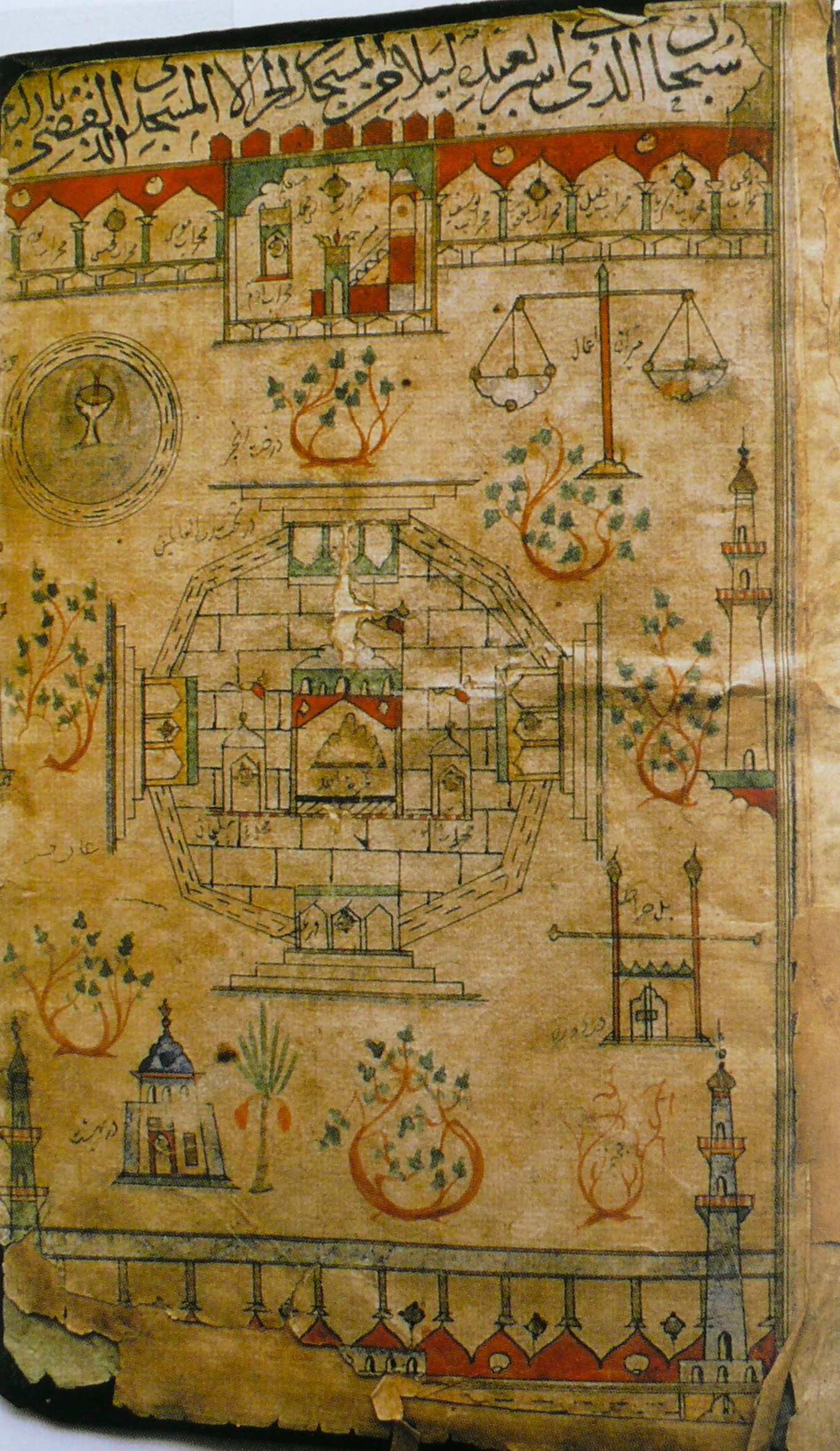 Zeichnung des Felsendoms mit dem schwebenden Felsen innen.